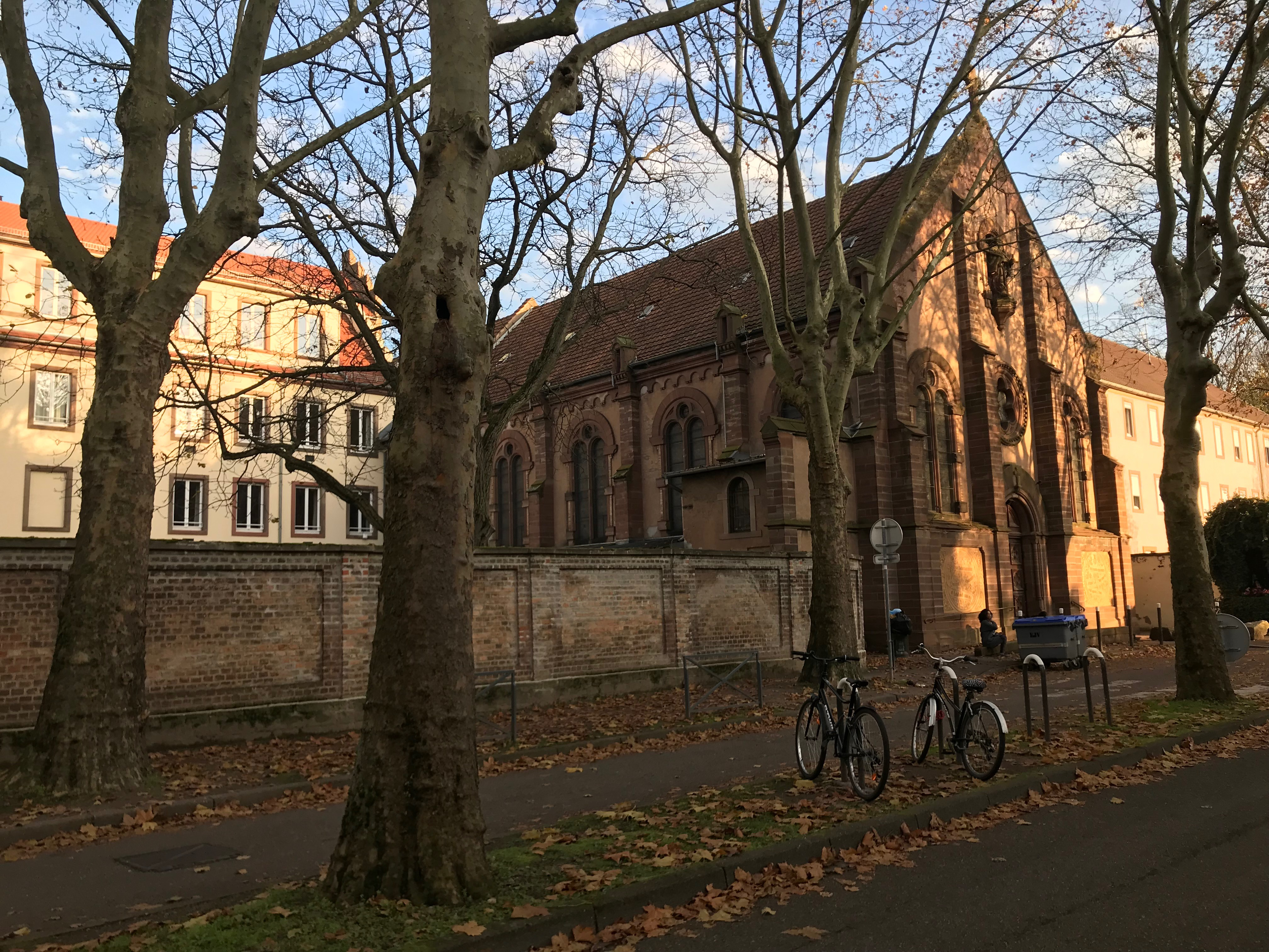 Photo - Ecole Joie de Vivre (façade avant) et aussi la la chapelle qui y est accolée